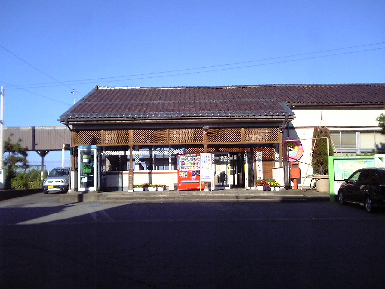 丸岡駅駅舎（2009/10/12撮影)